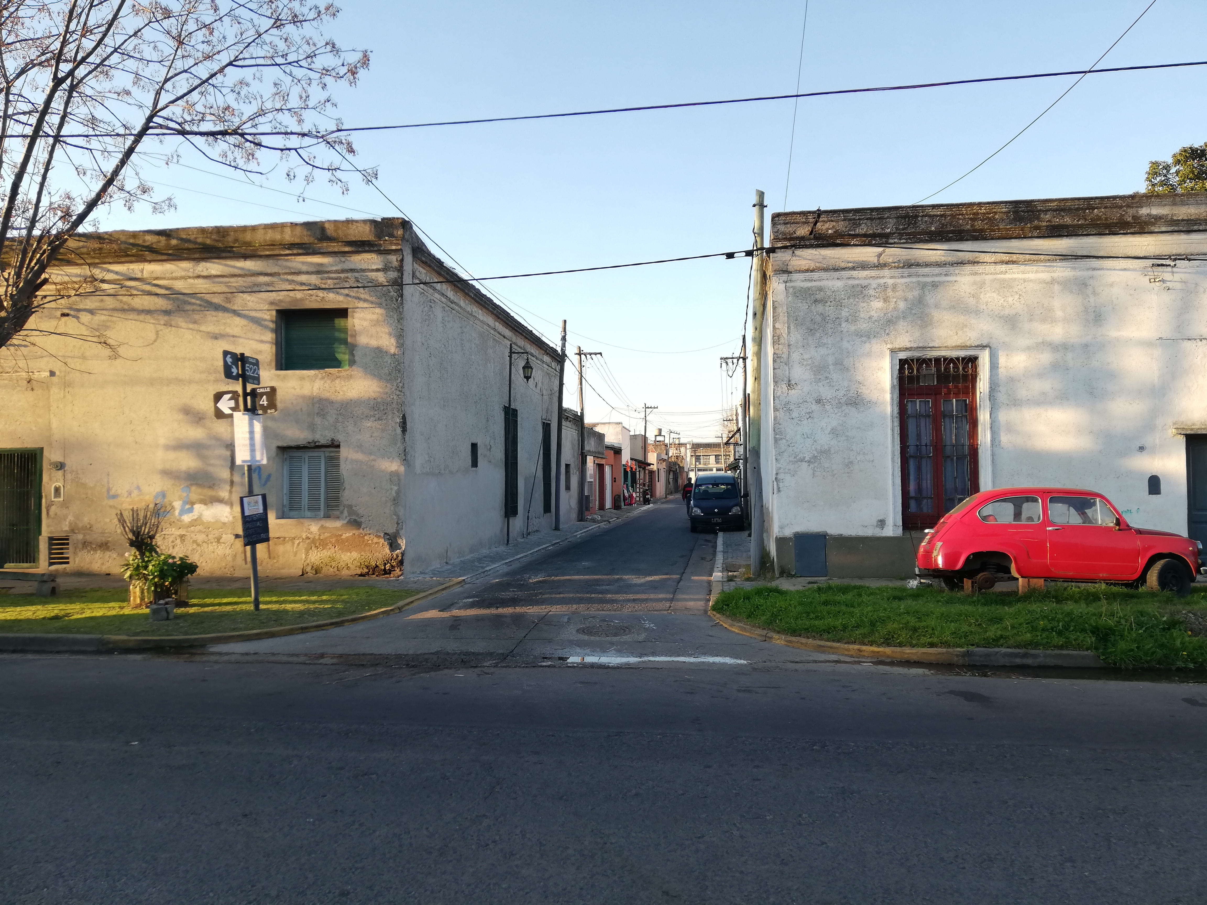 Casas típicas del primer barrio obrero de Latinoamérica